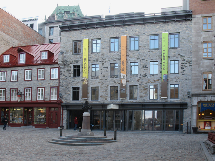 La maison Hazeur, à droite, héberge le musée de Place-Royale, Québec, Canada